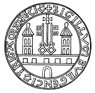 Altes Siegel der Stadt Riga